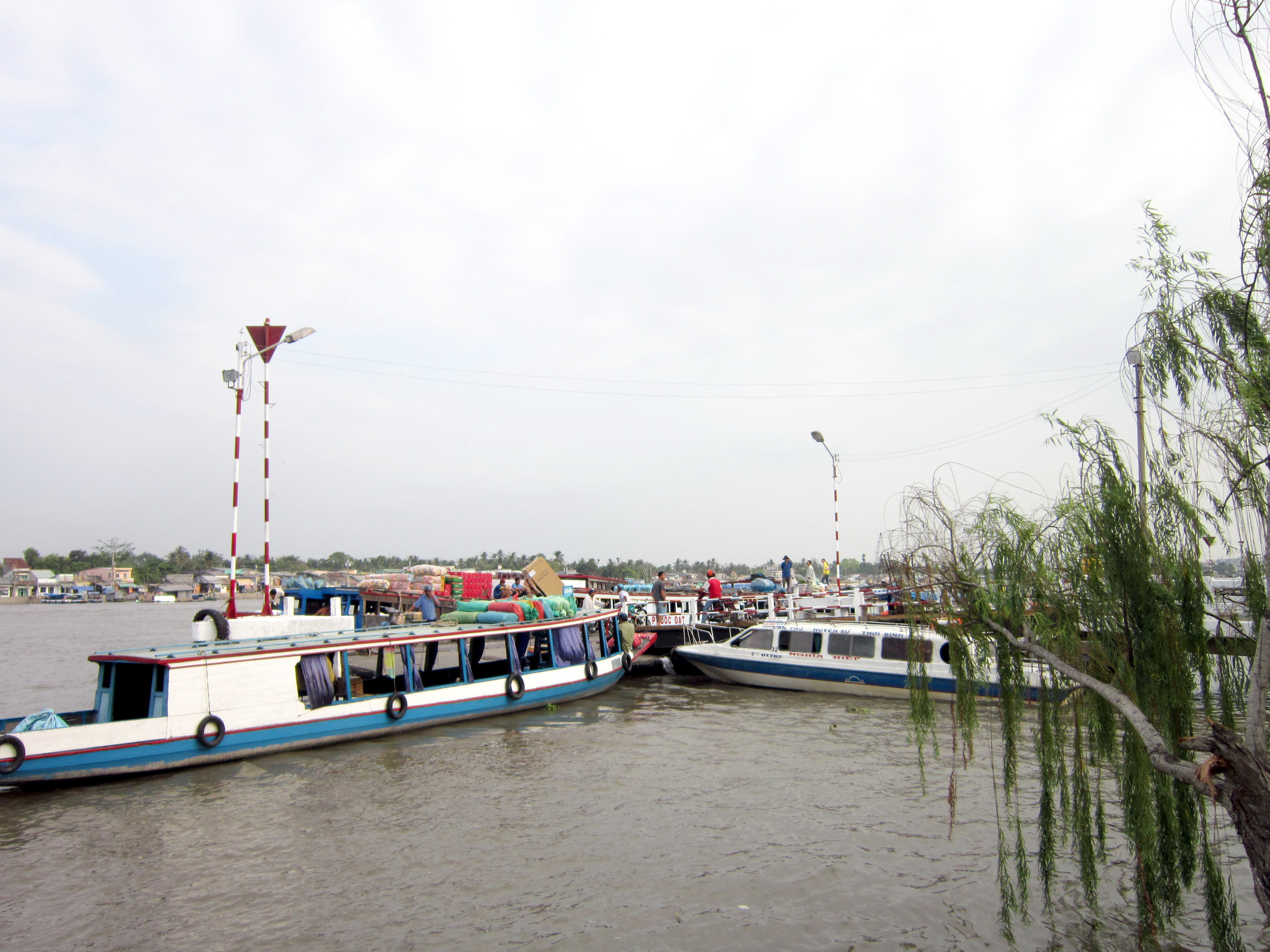 Bến tàu khách tại bến Ninh Kiều, thuộc quận Ninh Kiều, TP. Cần Thơ, Việt Nam.